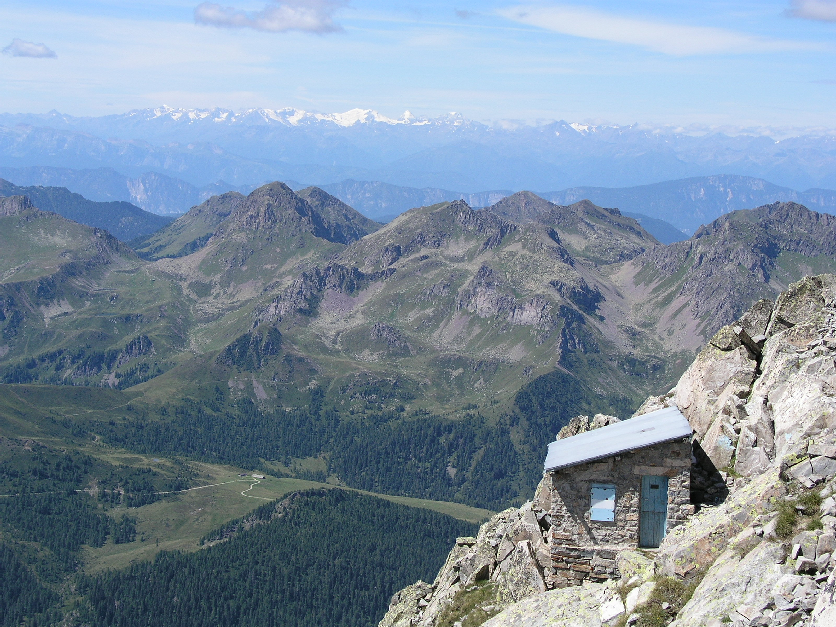 Bivacco Cavinato su Cima d'Asta